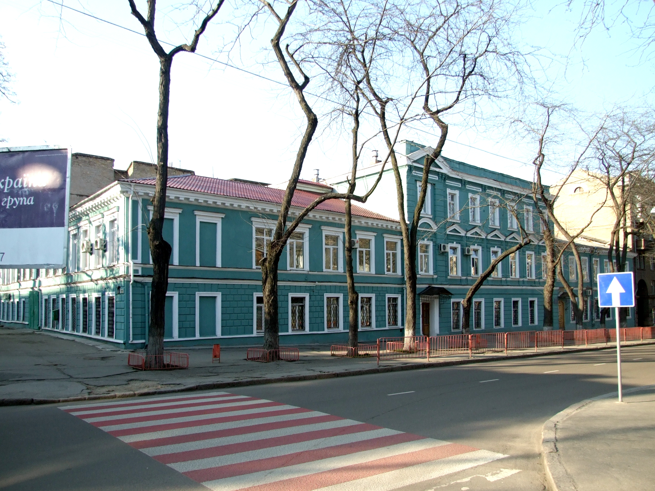 Будинок житловий Сафонова,в якому жив В.Ф. Алоіз - чеський композитор і віолончеліст